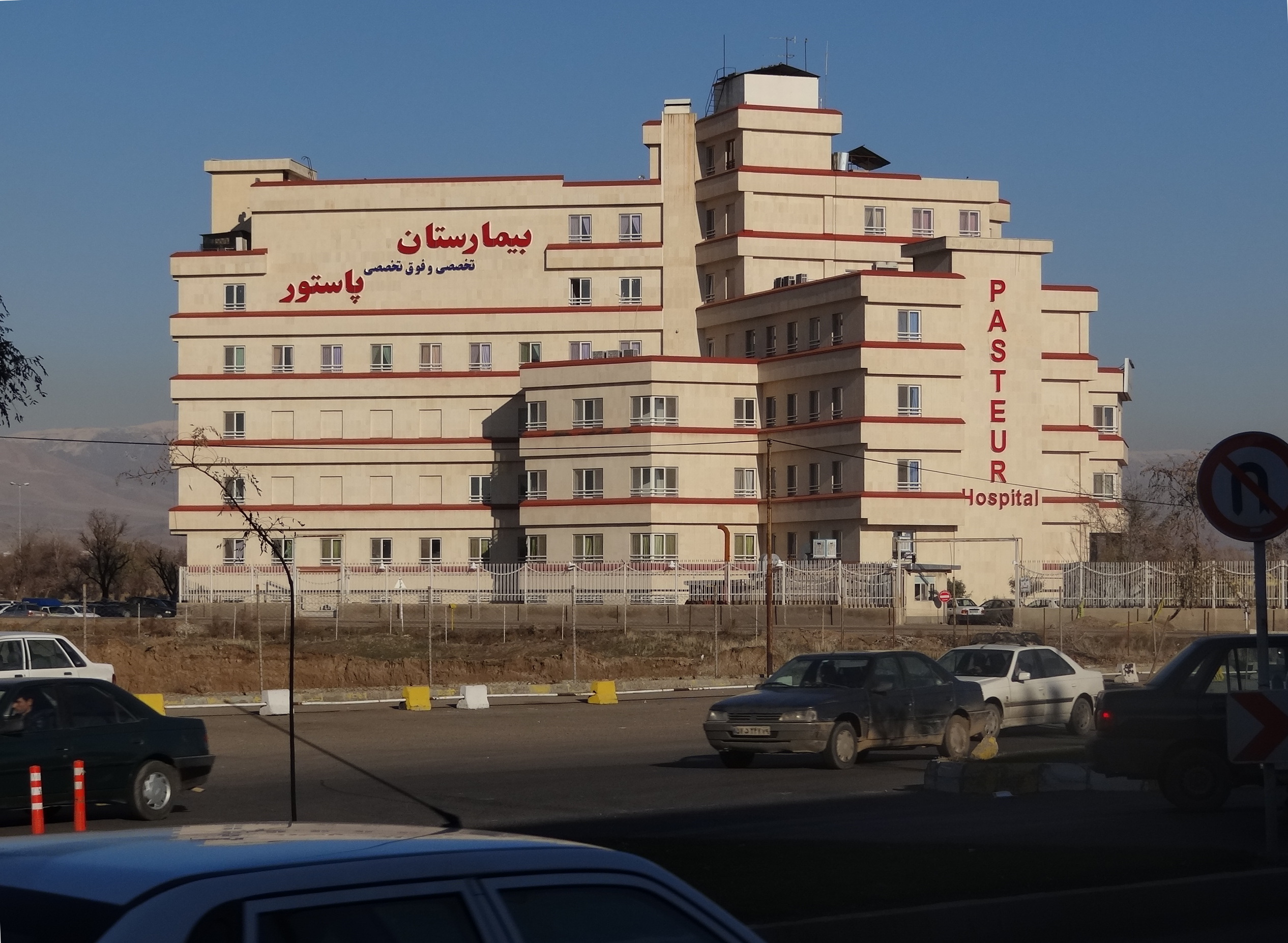 بیمارستان پاستور